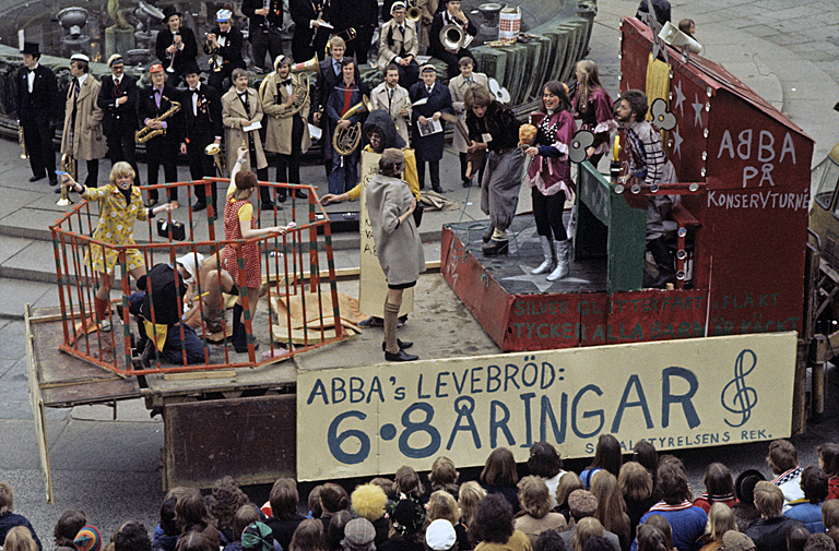 Studentkarneval. Motiv: Göteborg Nyckelord: Riksintressen Kategori: Stadsmiljö, Personer En av vagnarna i Chalmerscortègen passerar Götaplatsen.